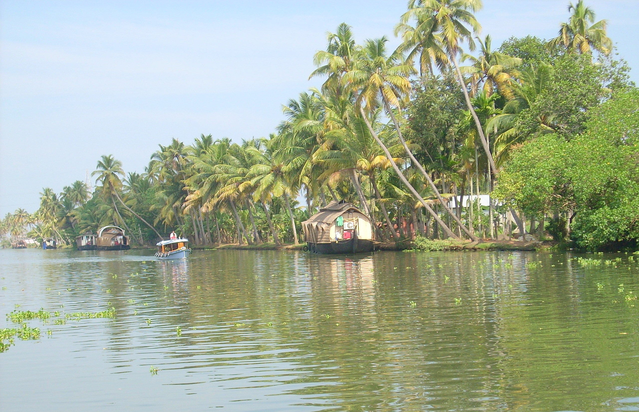 Kettuvallams line up in the Kuttanad area